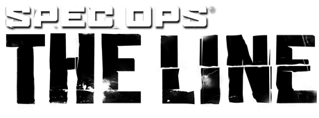 Logo do jogo Spec Ops: The Line para divulgação